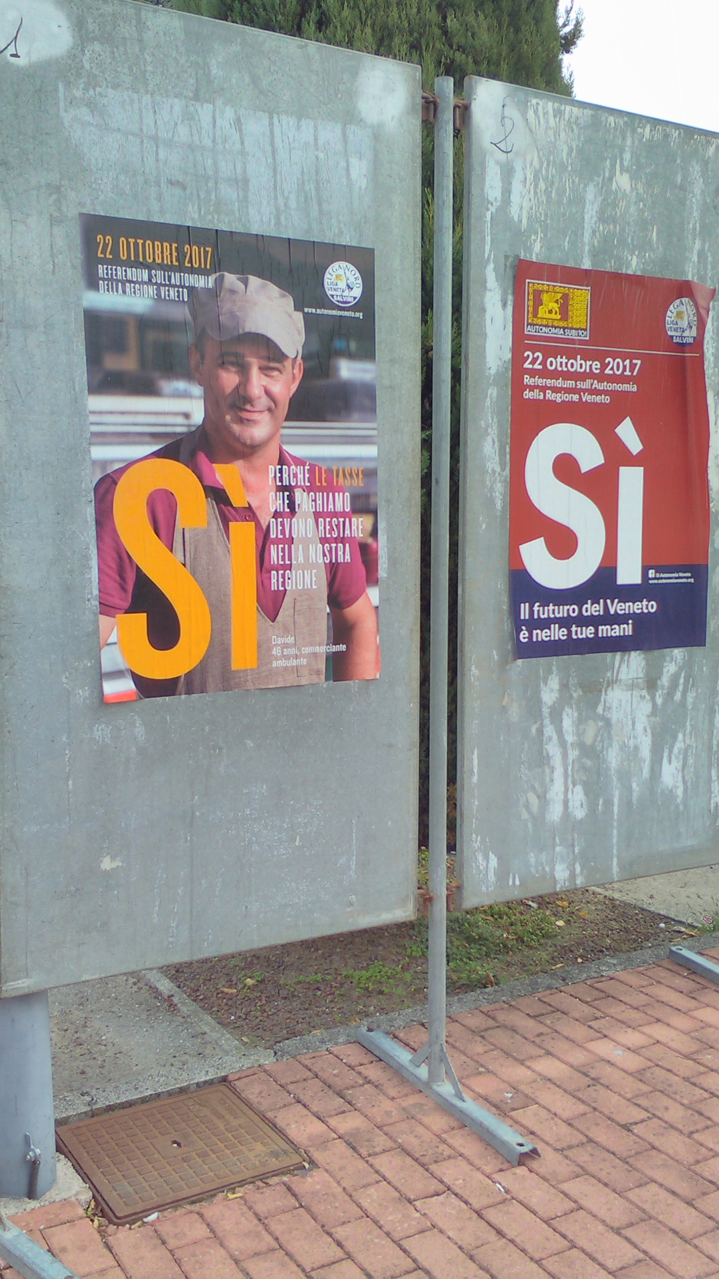 Propaganda referendum Veneto 2017